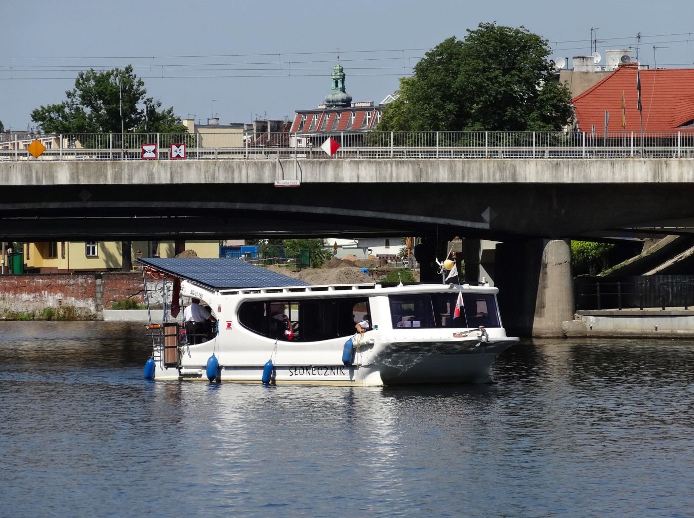 Mosty Solidarności w Bydgoszczy